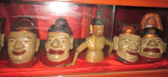 Các Thánh tượng đầu gỗ của chùa Keo Hành Thiện.